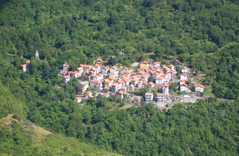 Foto propria Agosto 2008 Valbrevenna (Genova) - Veduta di Pareto